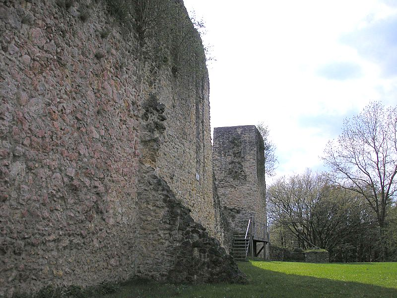 Burg Guessenburg, Inner side of Curtain Wall ruins